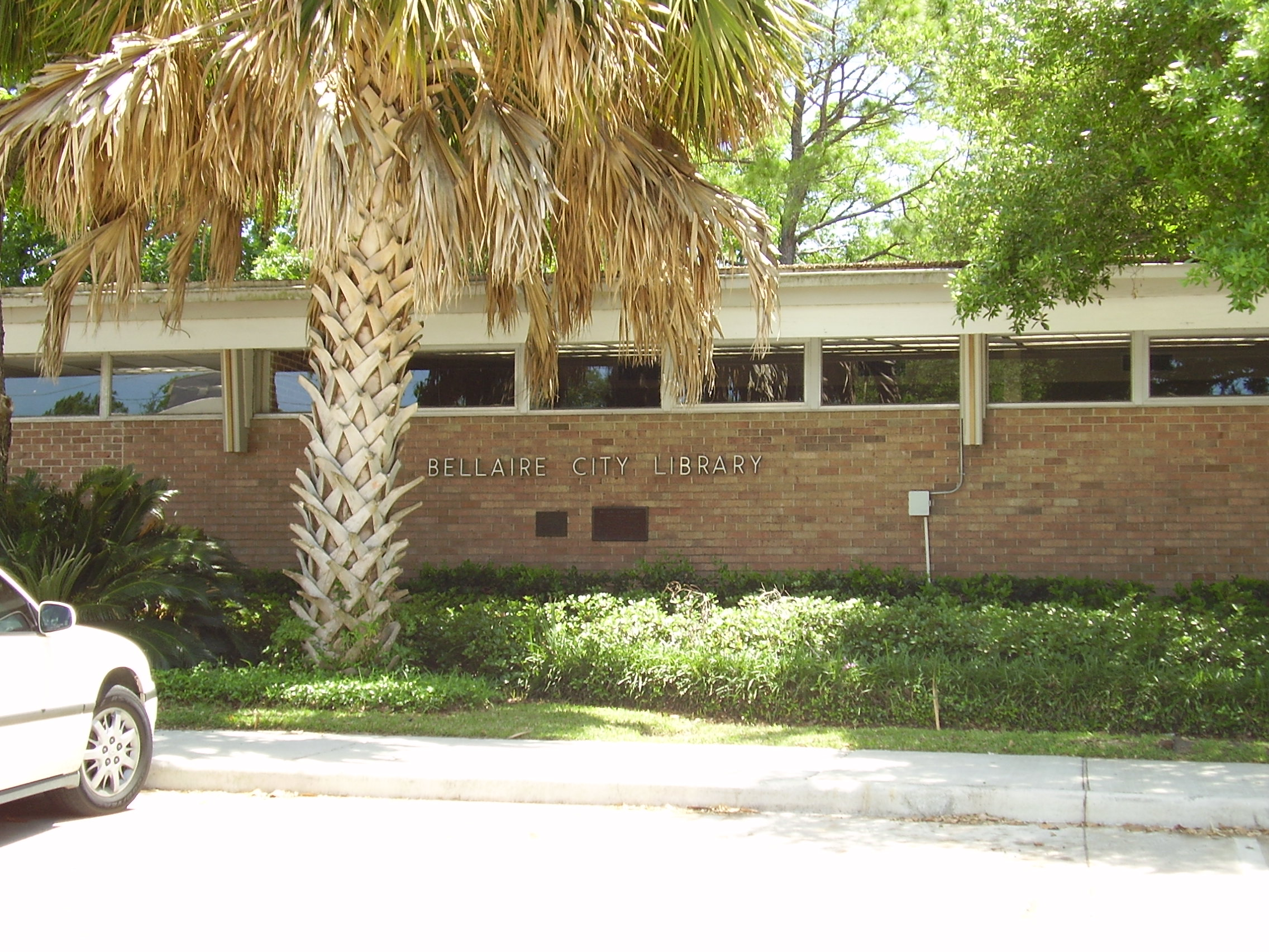 Bellaire Library